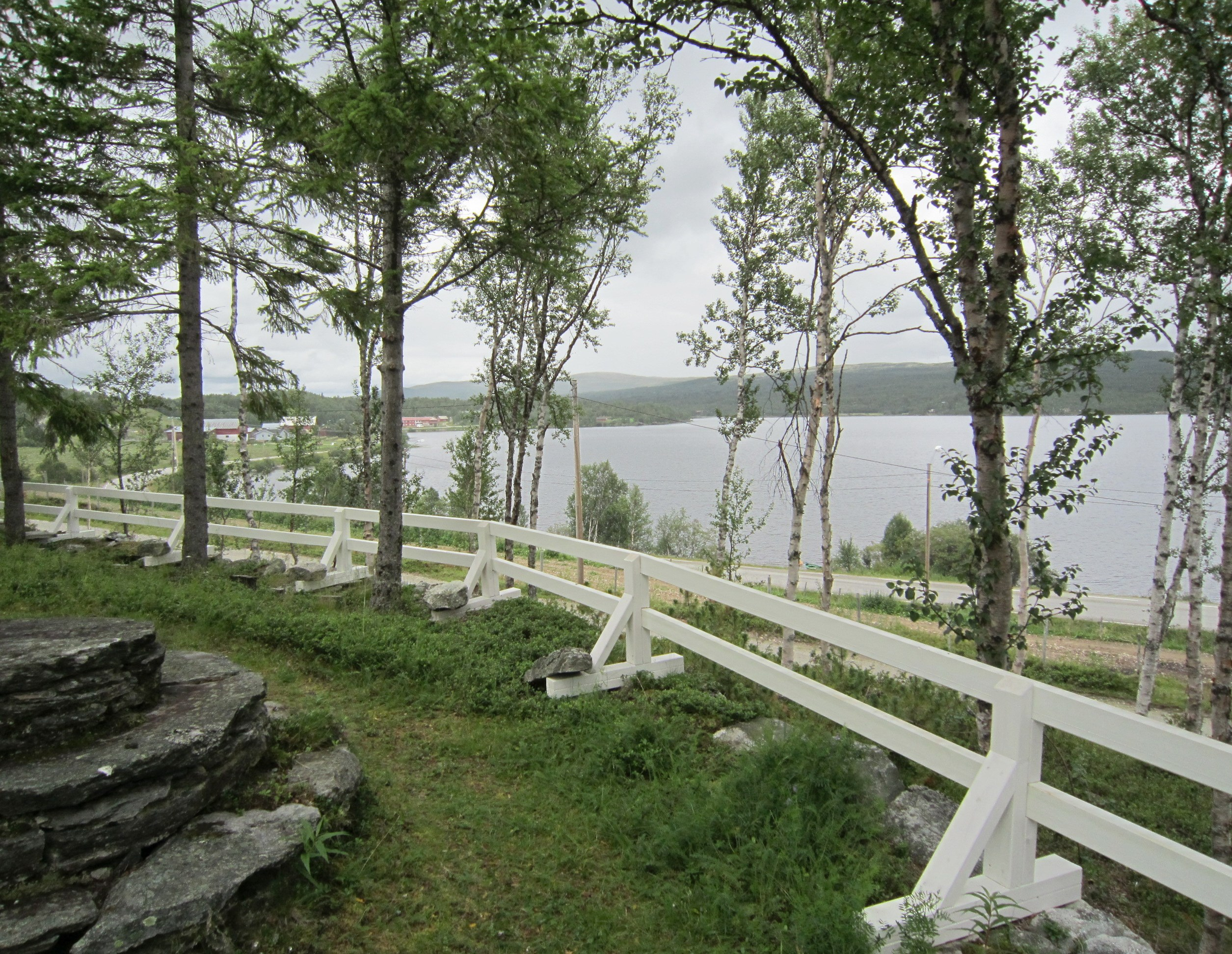 Narsjøen sett fra Narbuvoll kirkegård